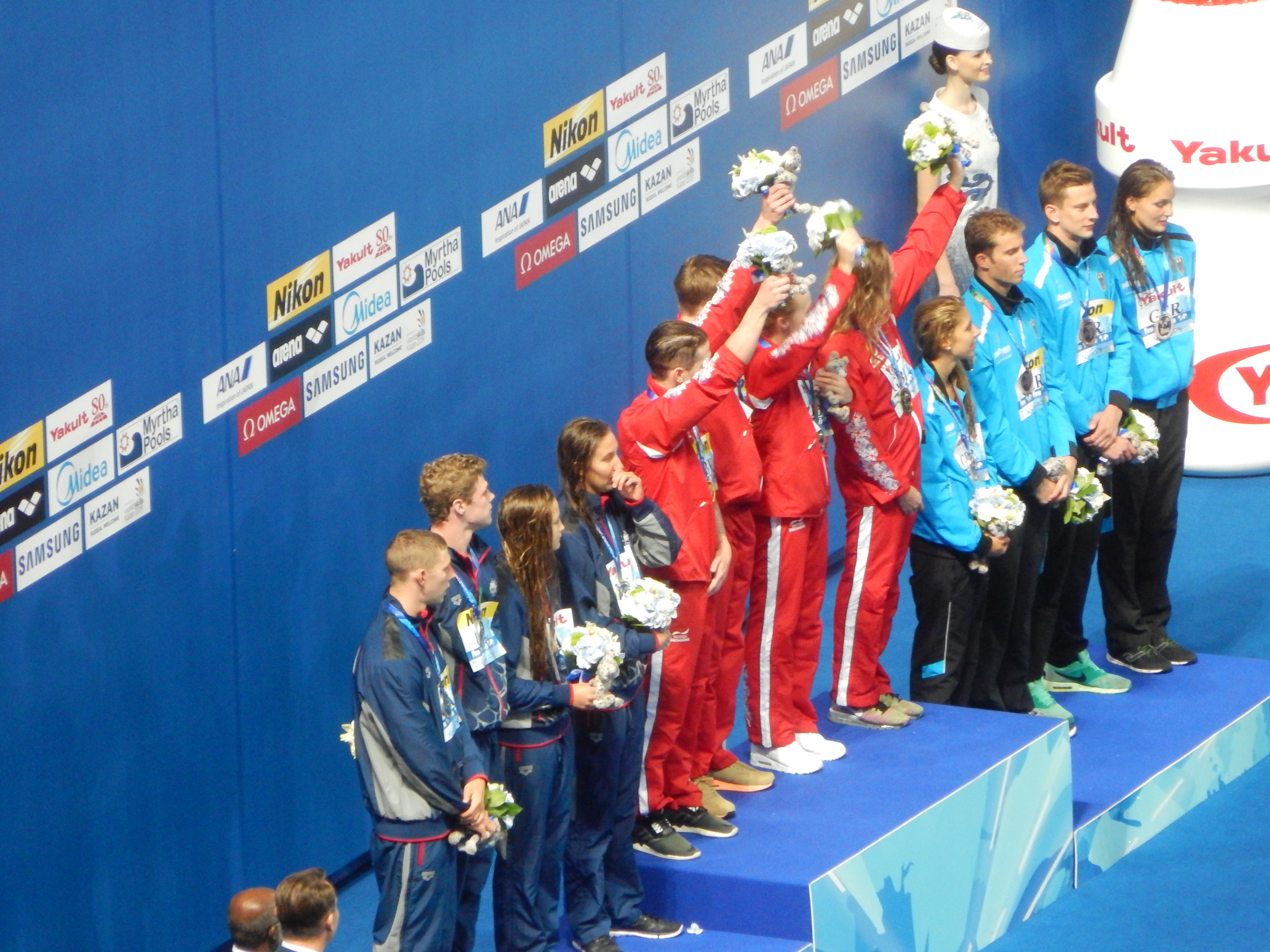 Медалисты чемпионата мира по плаванию 2015 в смешанной комбинированной эстафете